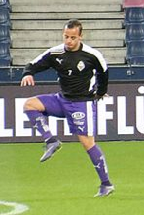 Felipe Dorta